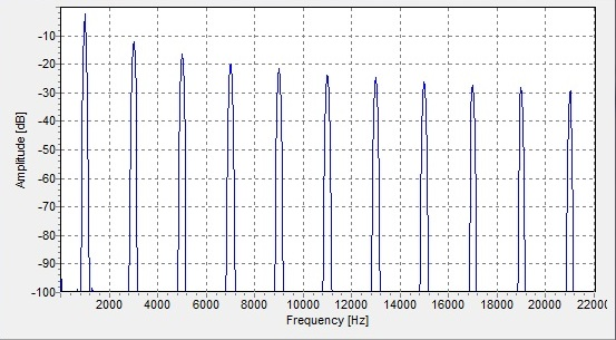 Spektrum der Oberwellen einer Rechteckschwingung mit 1000 Hz